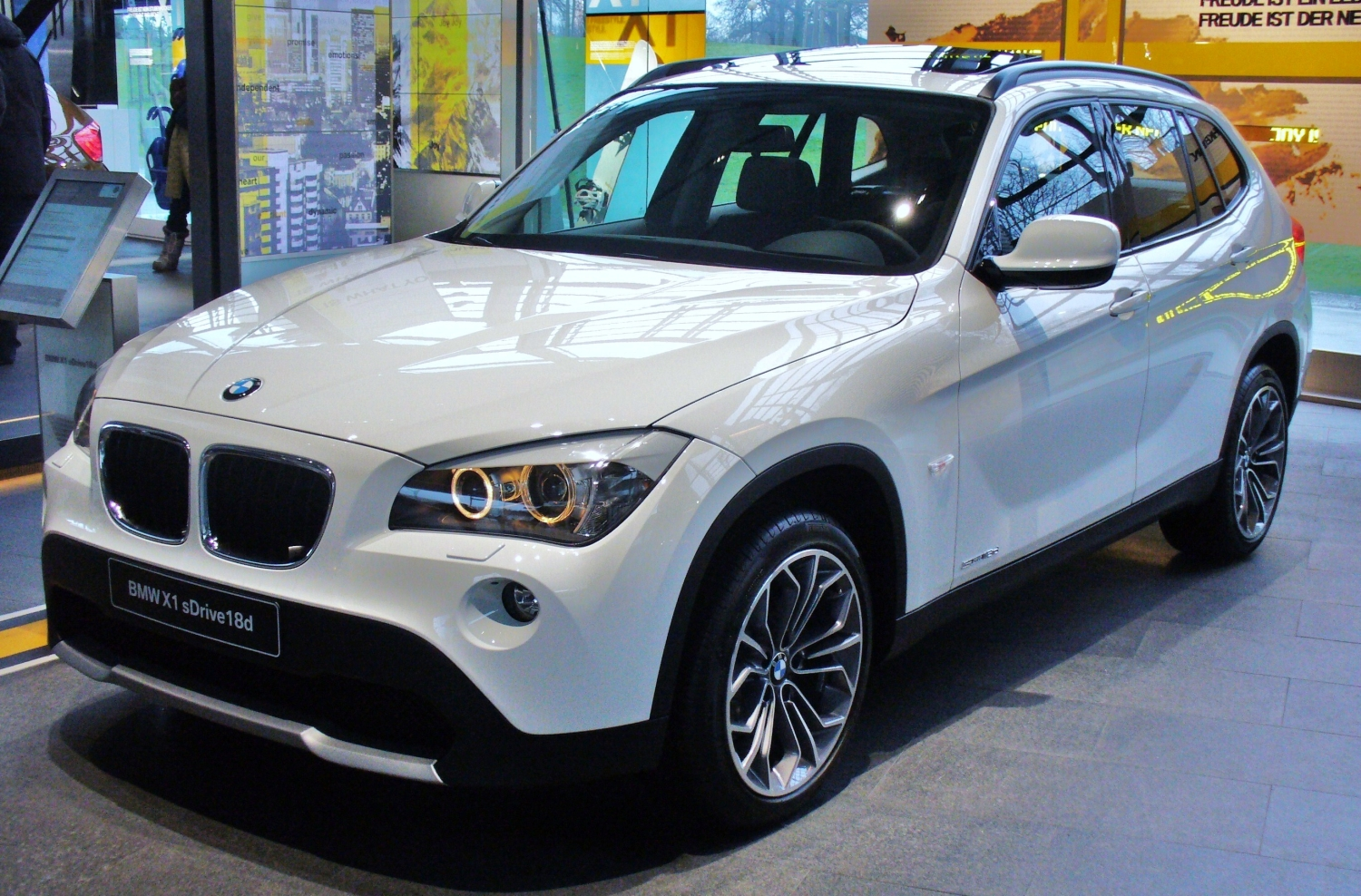 BMW X1